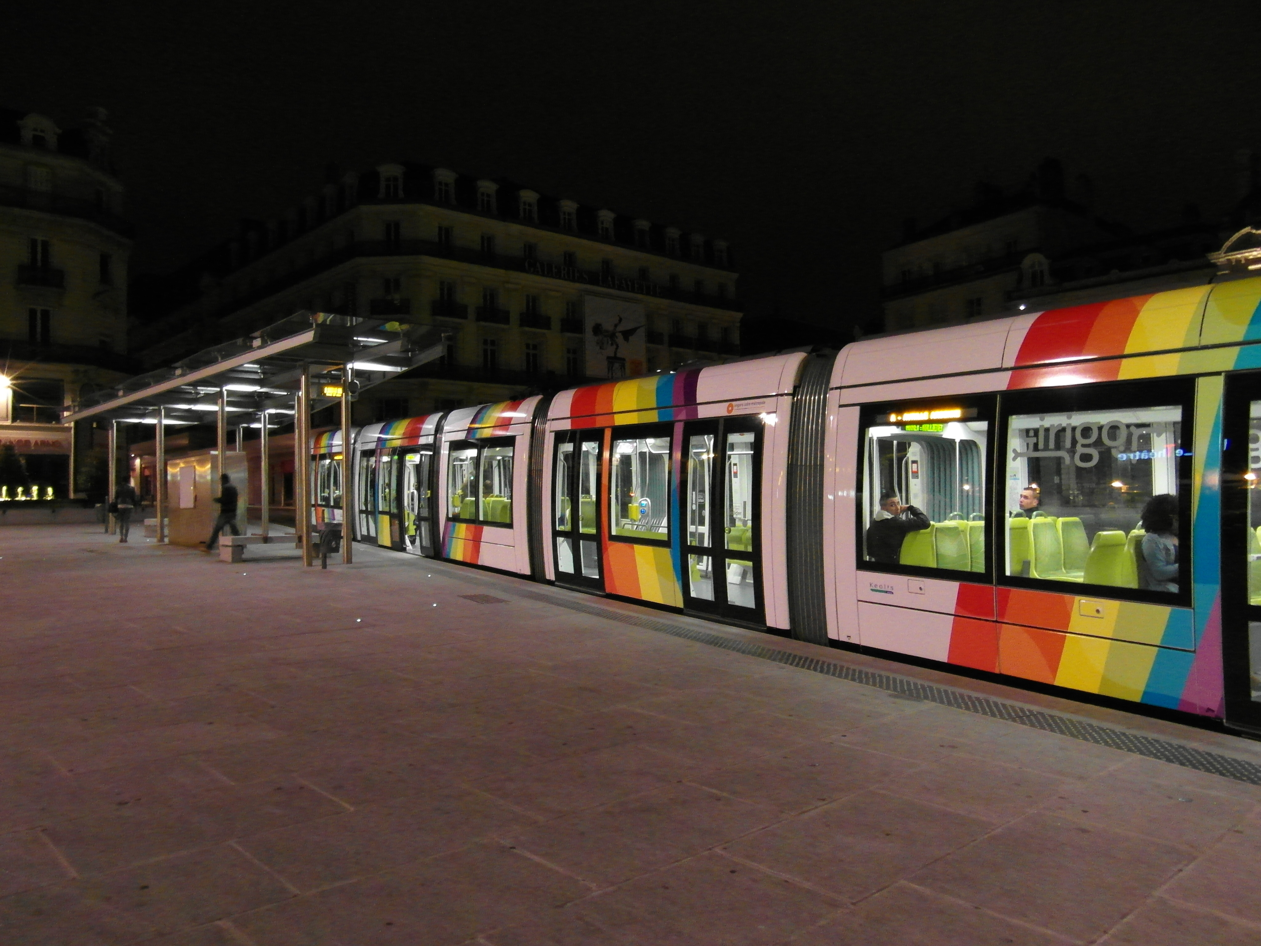 Straßenbahn Angers - Innenstadtabschnitt Place du Ralliement und Rue de la Roë - eingleisige Streckenführung - APS - Stromschiene